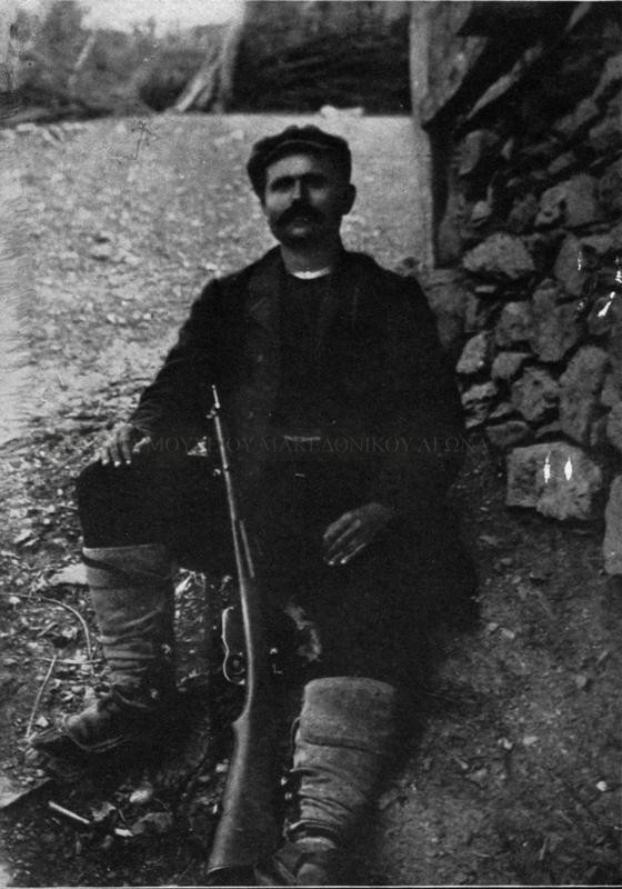 Христо Чернопеев.